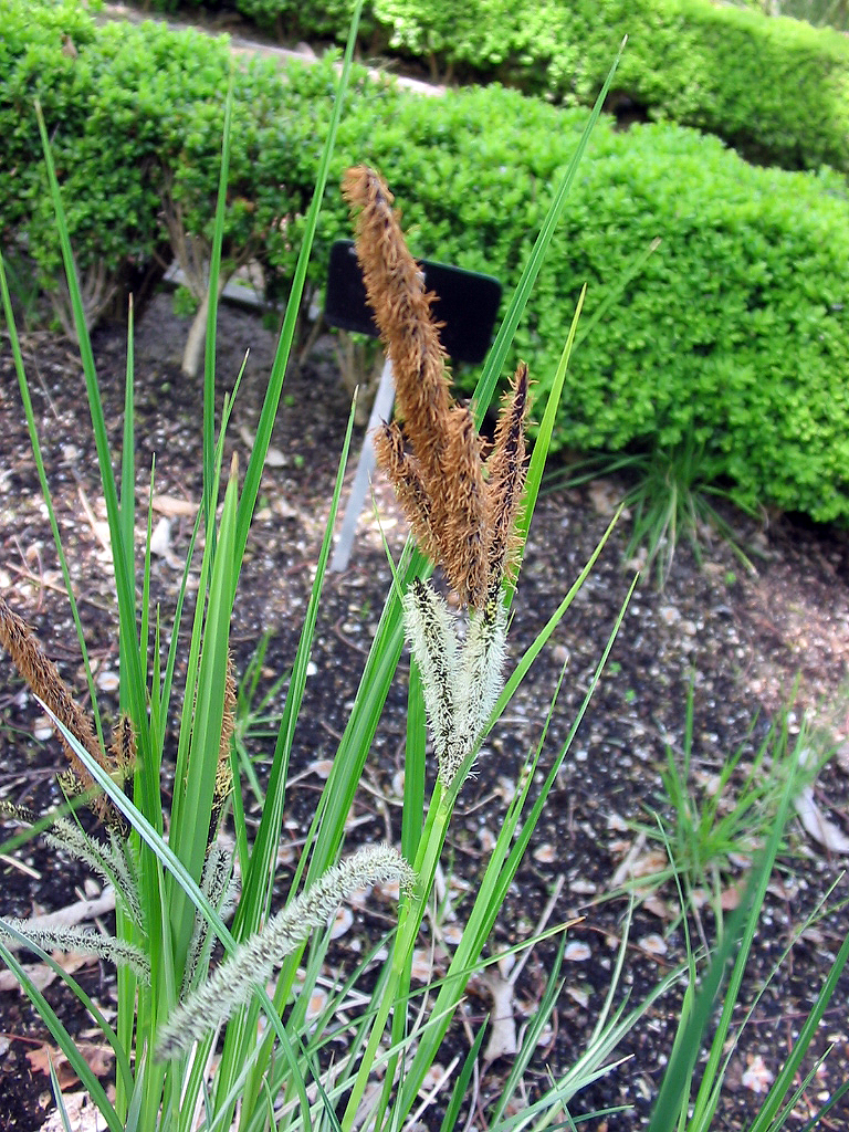 Fotografía realizada por Pablo Alberto Salguero Quiles. Ejemplar de 50 cm. mes de Abríl. En el Real Jardín Botánico de Madrid (España). Zona gramíneas. Ordo: Poales Familia: Cyperaceae Genus: Carex Species:Carex riparia Subspecies: C. r. variegata